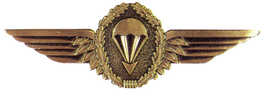 deutsches Fallschirmspringerabzeichen in der Stufe I - Bronze